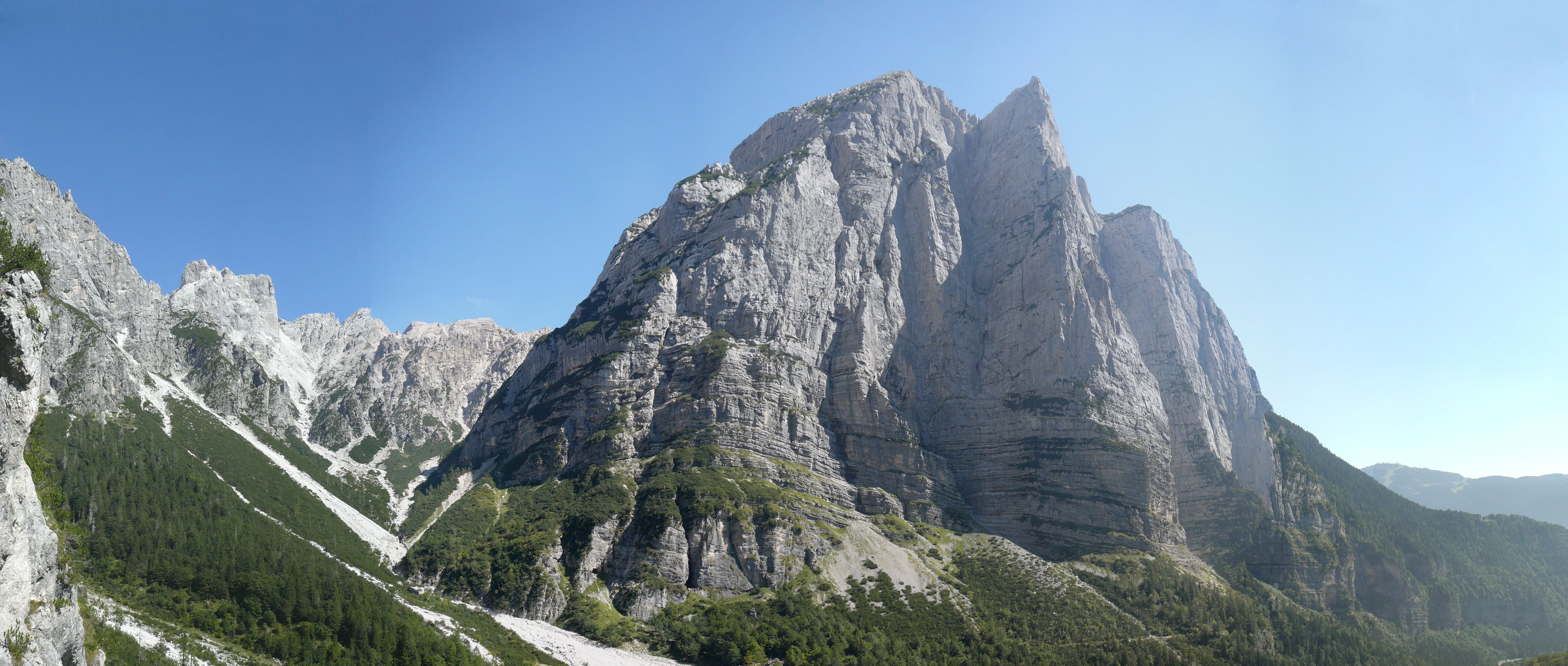 Gruppo del Brenta - Croz dell'Altissimo